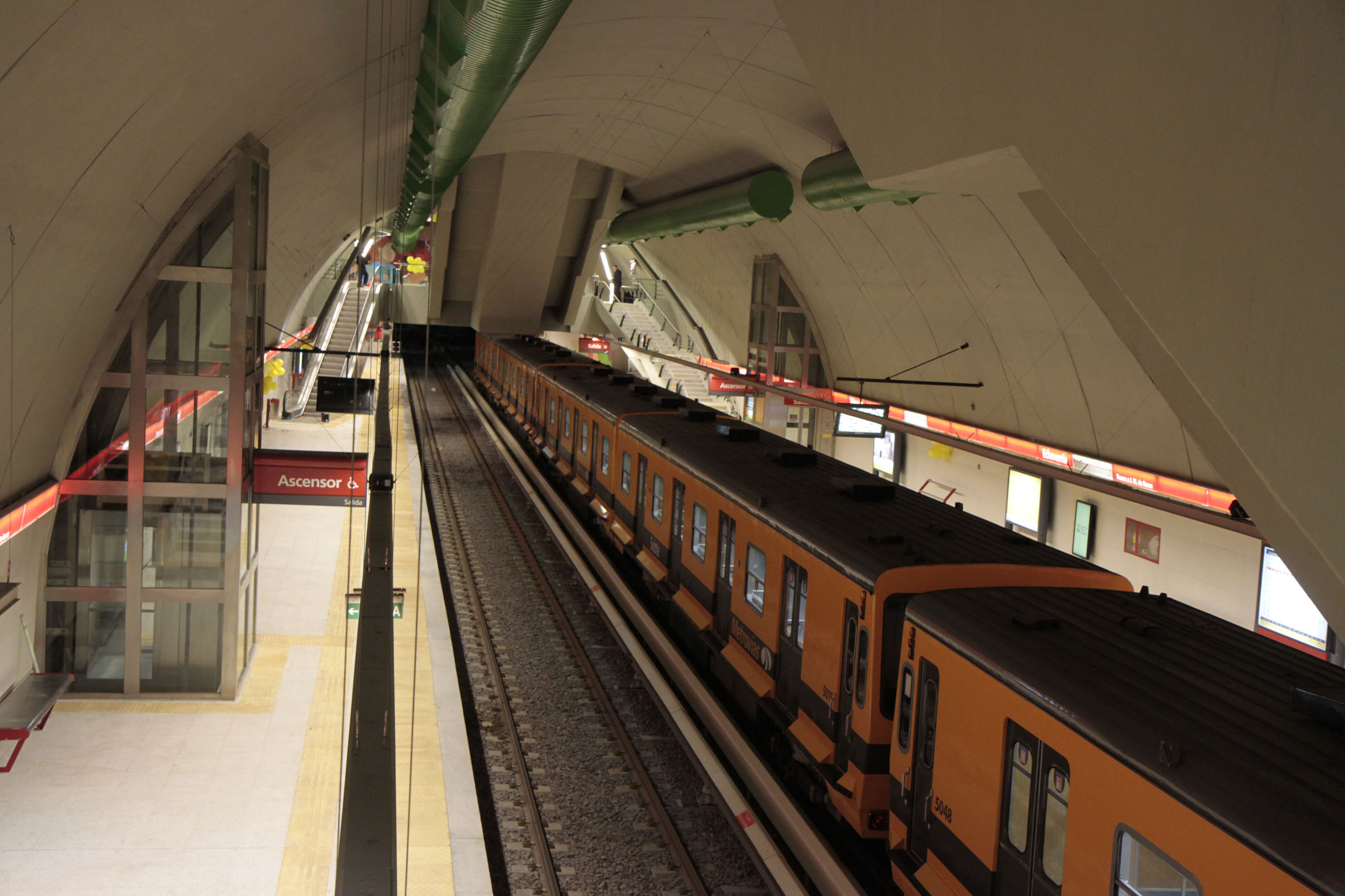 anden de la Estación Echeverría de la Línea B del Subte de Buenos Aires; día de la inauguración